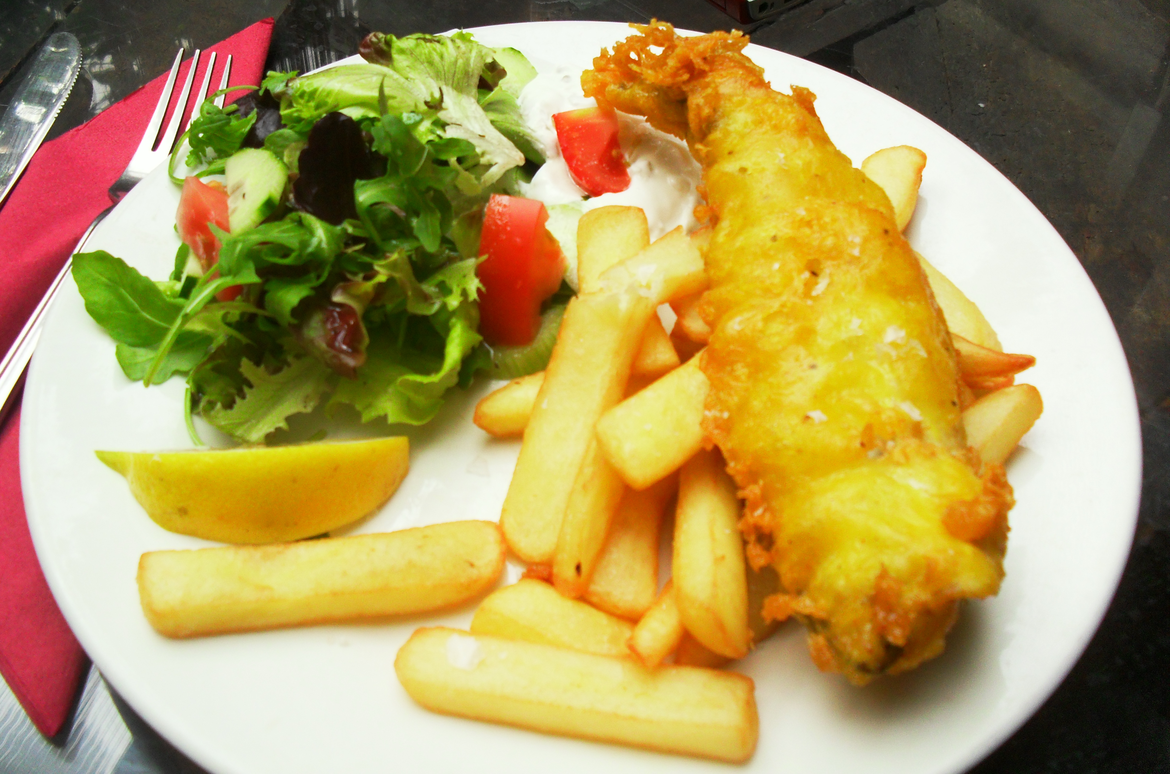 Fish & Chips en Portobello Road, Londres.